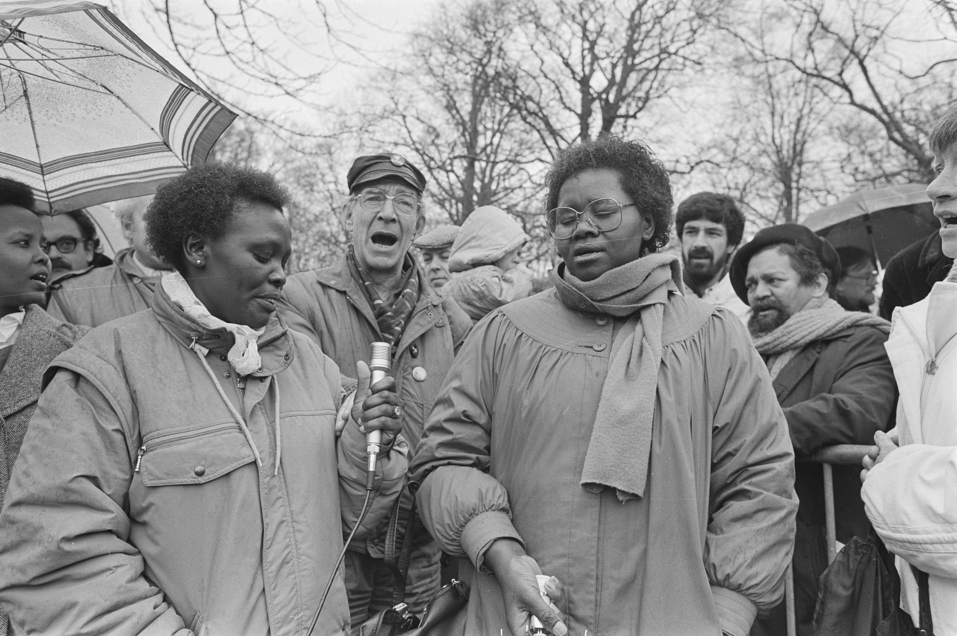 Collectie / Archief : Fotocollectie Anefo Reportage / Serie : Betoging bij de Zuid-Afrikaanse ambassade in Den Haag voor de vrijlating van de politieke gevangenen Heleen Pastoors en Klaas de Jonge Beschrijving : ambassades, betogingen, politieke gevangenen, apartheid Datum : 14 april 1986 Locatie : Den Haag, Zuid-Holland Trefwoorden : ambassades, apartheid, betogingen, politieke gevangenen Fotograaf : Croes, Rob C. / Anefo Auteursrechthebbende : Nationaal Archief Materiaalsoort : Negatief (zwart/wit) Nummer archiefinventaris : bekijk toegang 2.24.01.05 Bestanddeelnummer : 933-6234